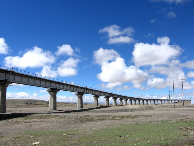 Qingzang railway 青藏鐵路